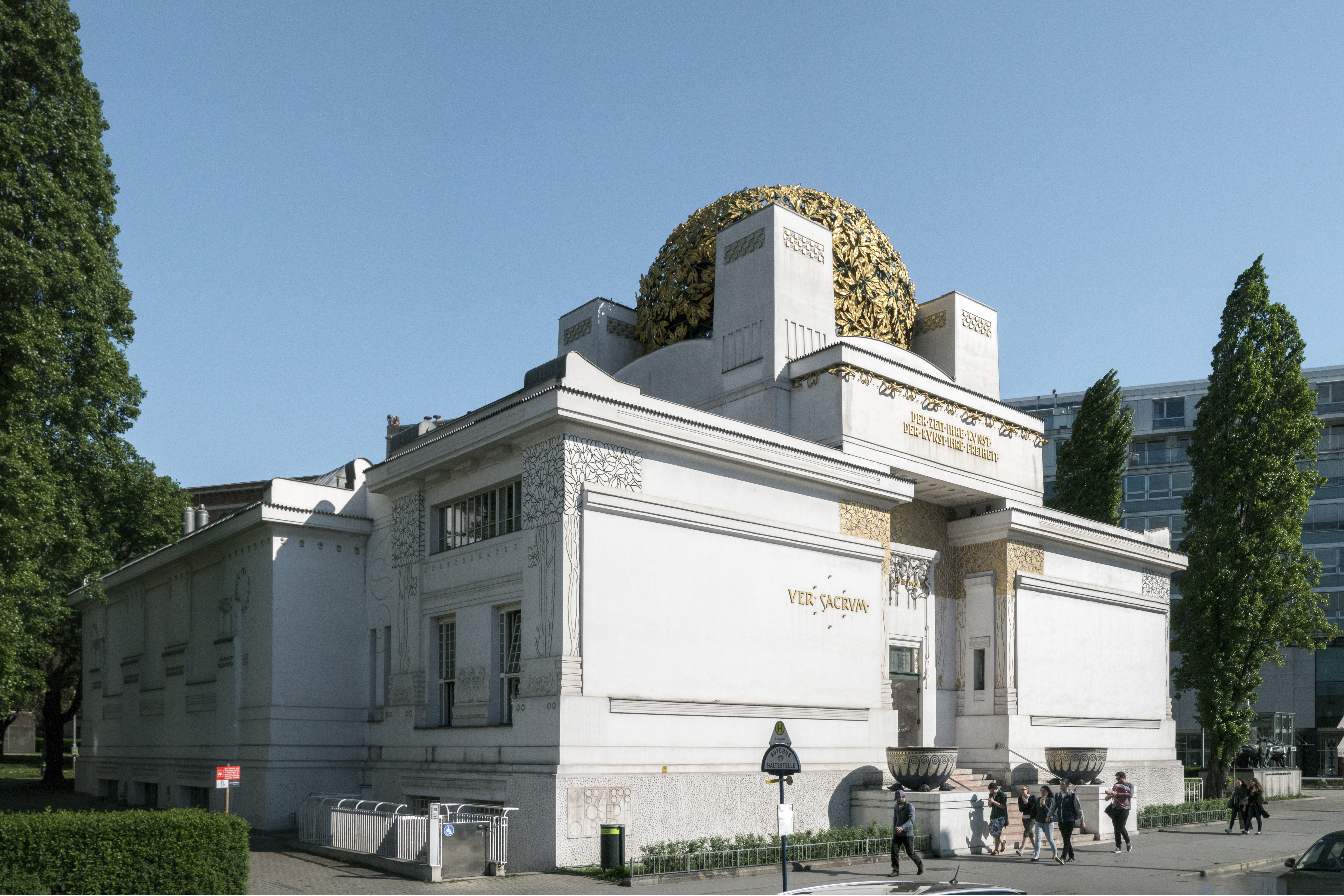 Wien Secessionsgebäude